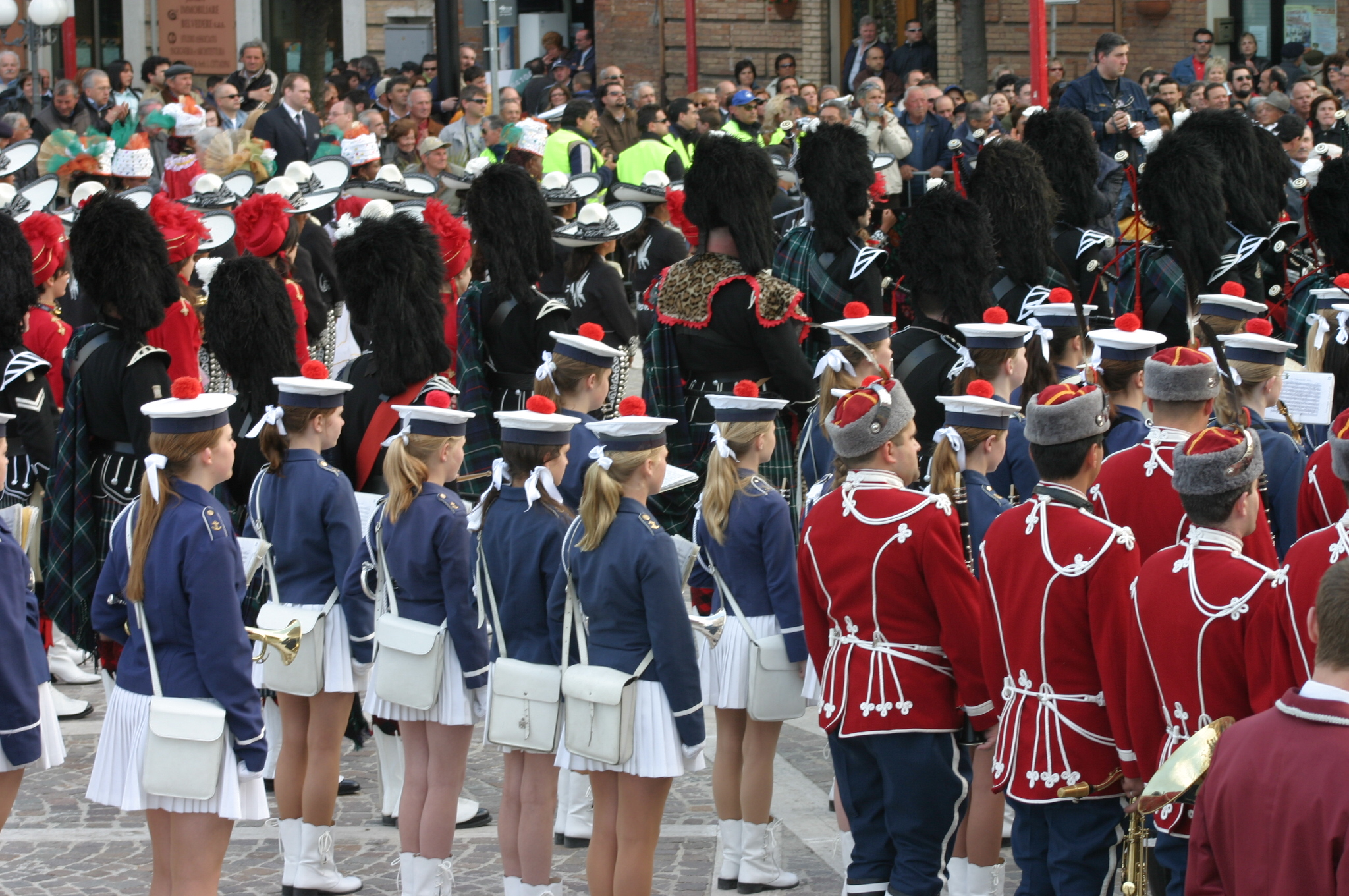 schiera di bande sul belvedere nel festival 2006